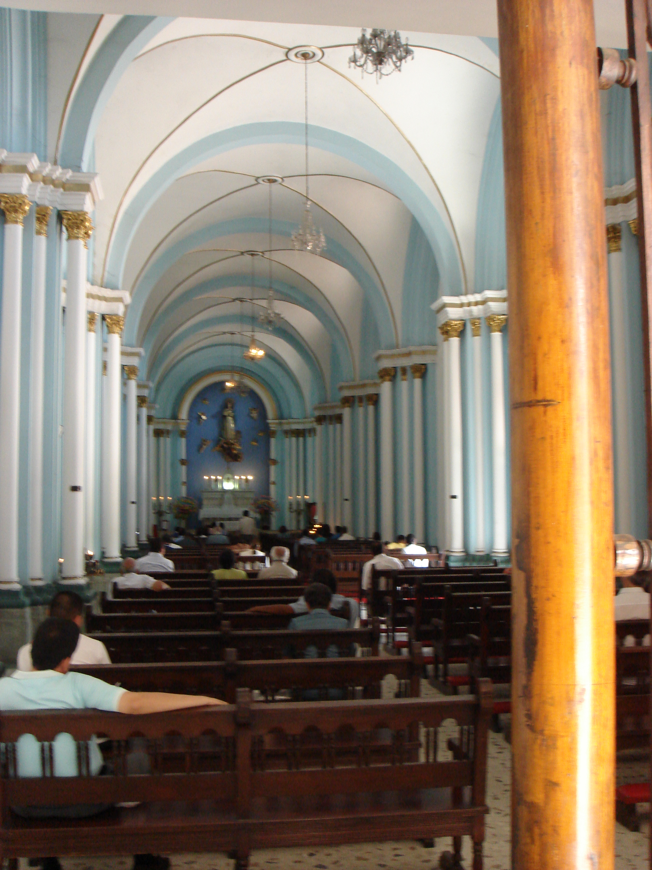 Inside Capilla de la Inmaculada, Cali